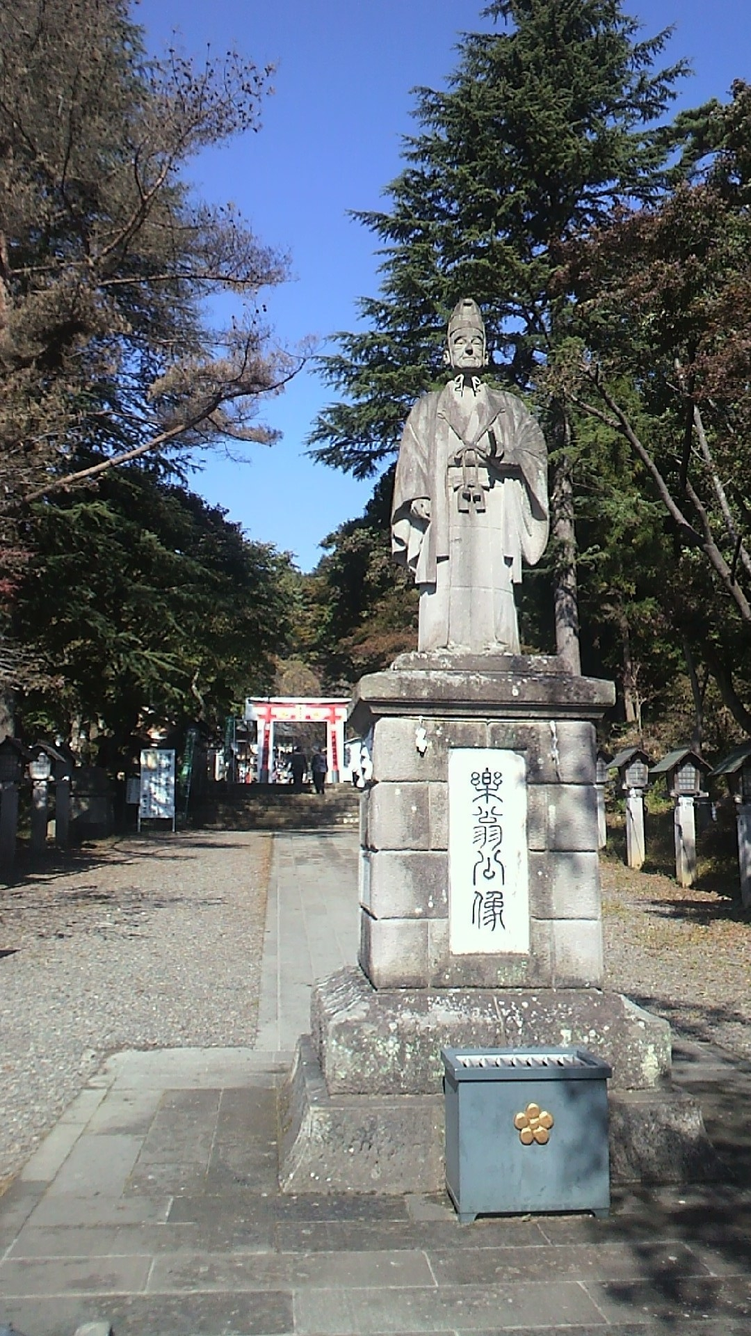 南湖神社入口にある楽翁像